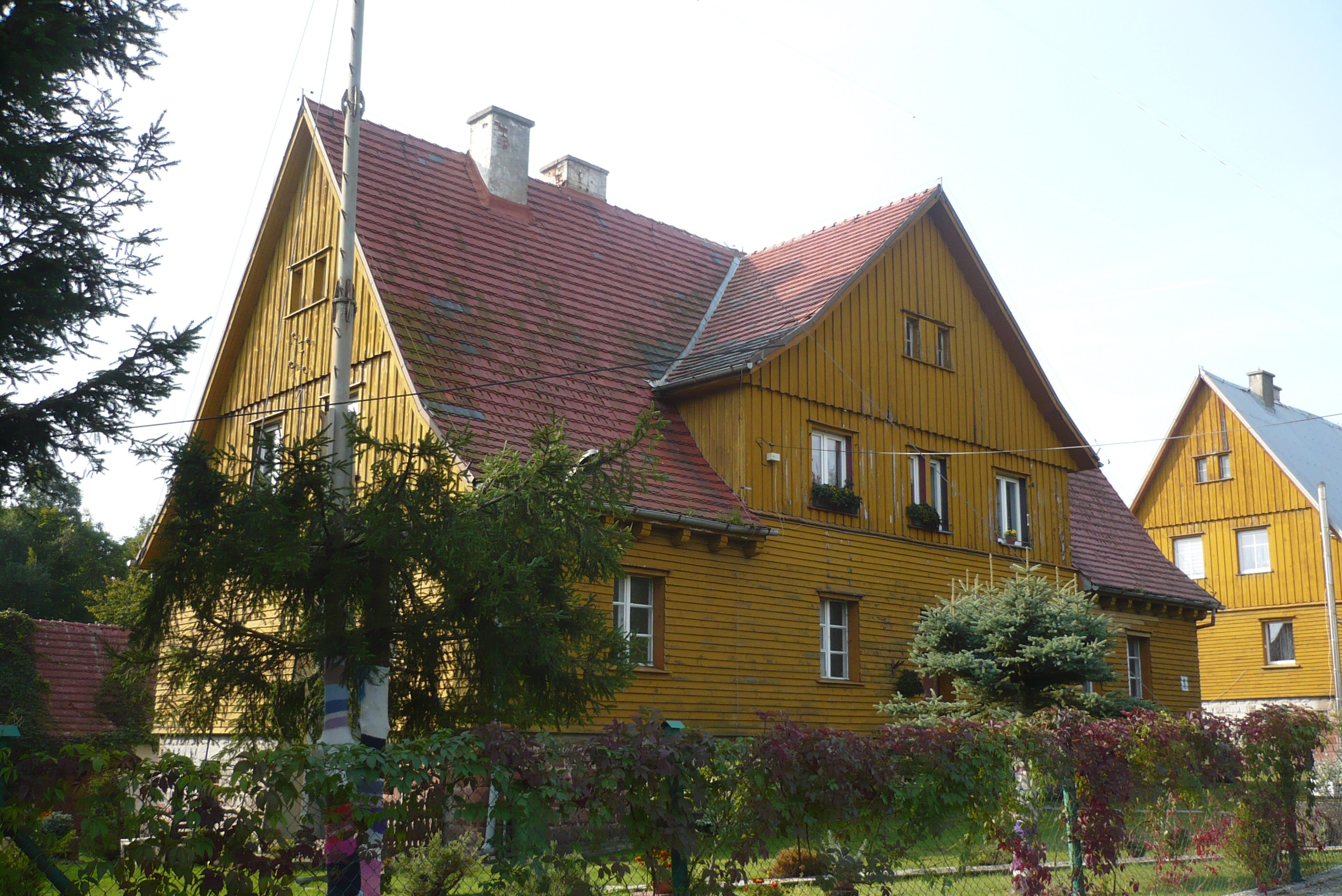 Bartnica. Strażnica